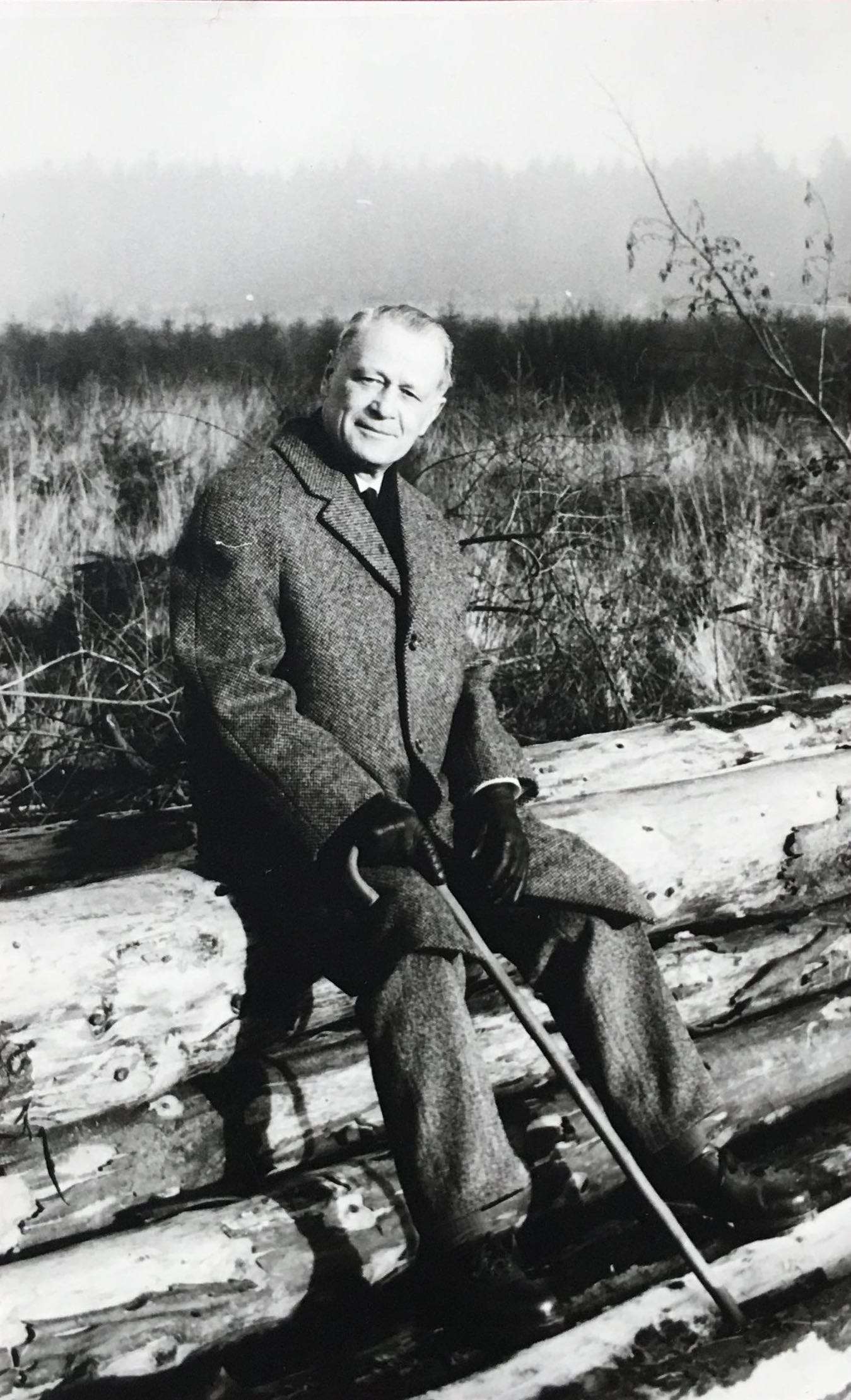 Foto nach der Pensionierung